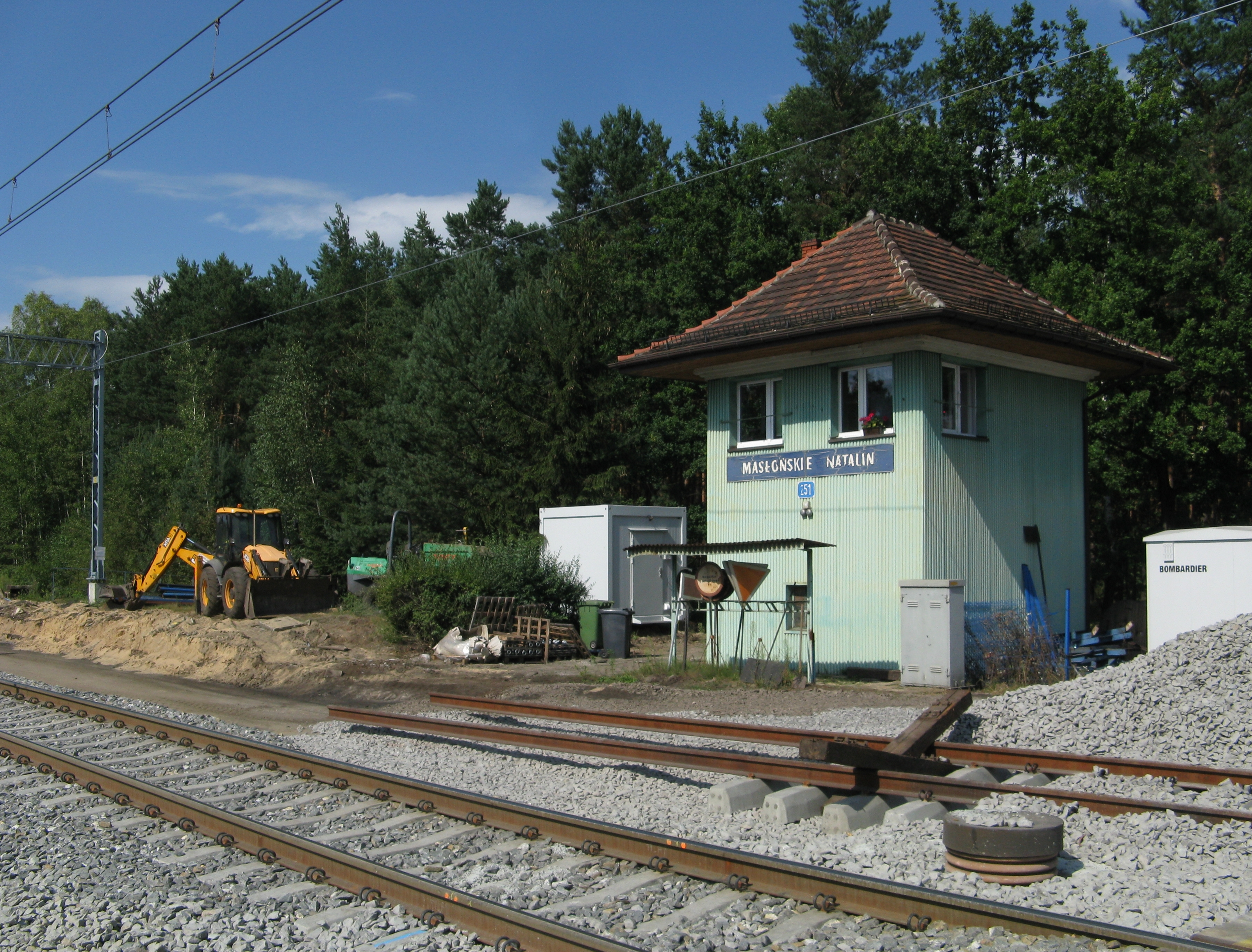 strażnica przejazdowa 251 na przystanku Masłońskie Natalin (dawniej posterunek blokowy Ostdorf, po II wojnie światowej Ostrów)